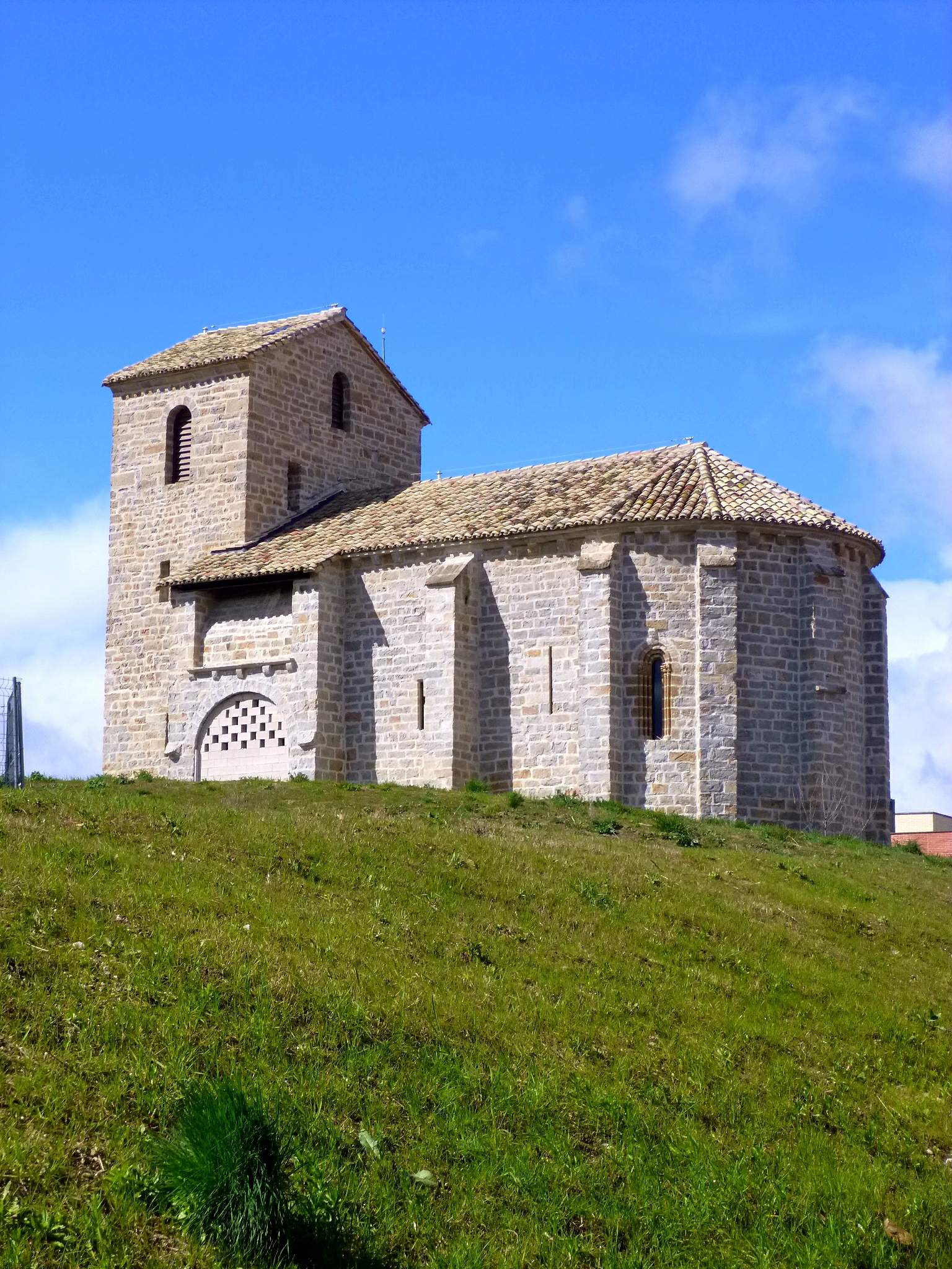 Antigua iglesia de Santa Engracia, en Sarriguren (Egüés, Navarra)